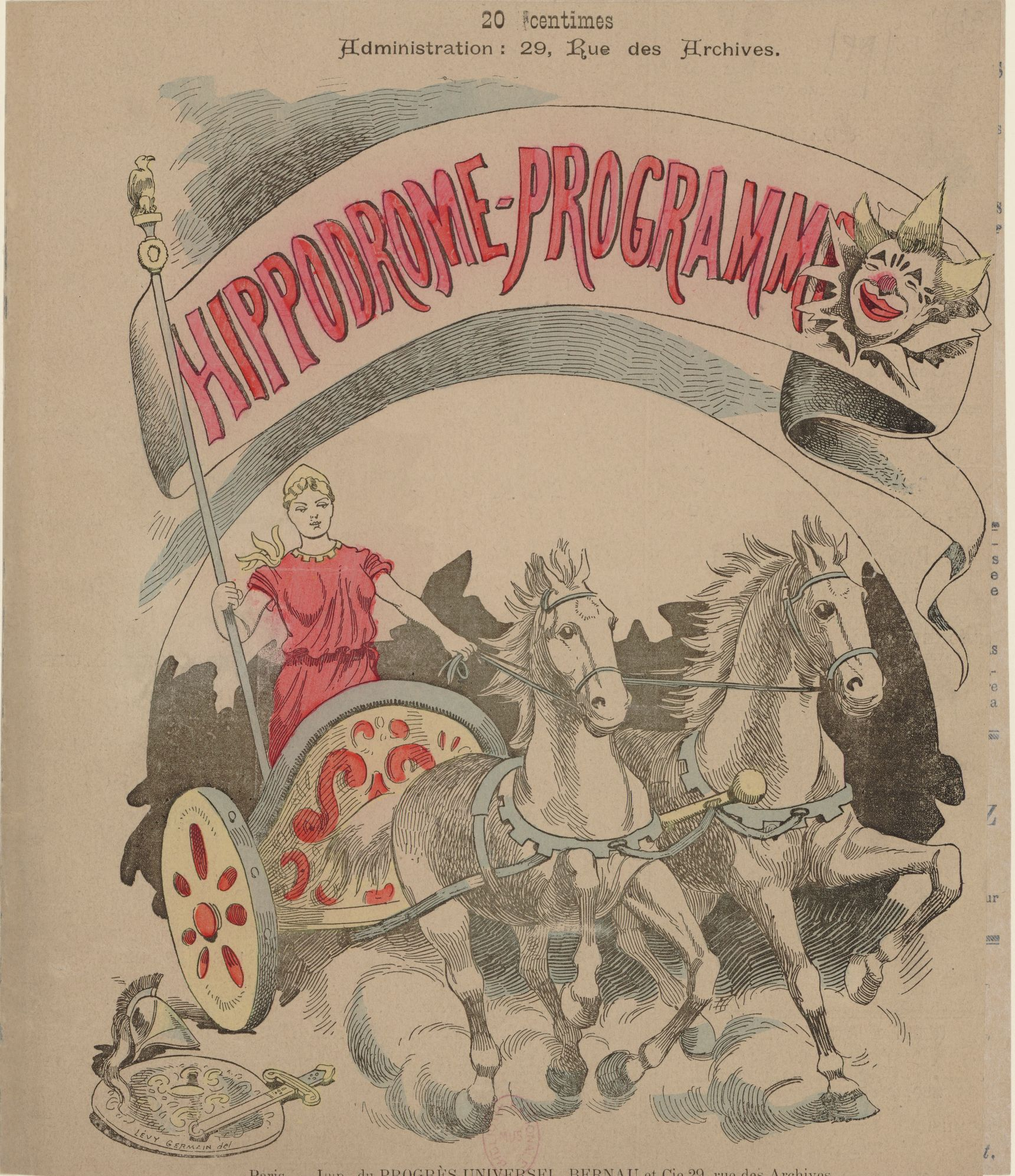 Couverture d'un programme de l'Hippodrome au pont de l'Alma. Il s'agit de Néron pantomime en trois actes sur une musique d’Édouard Lalo, livret de Paul Milliet.